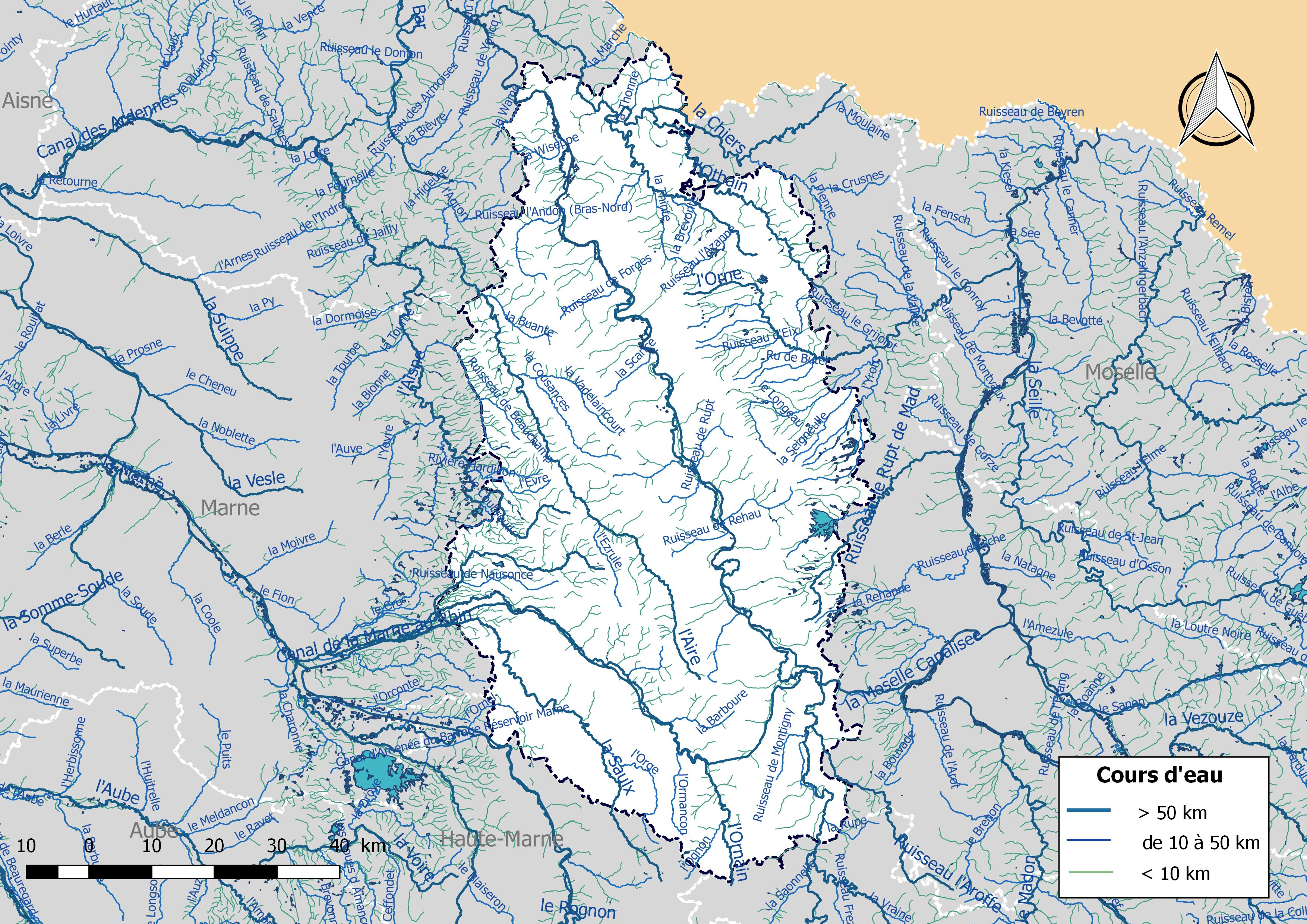 Réseau hydrographique du département de la Meuse (France).